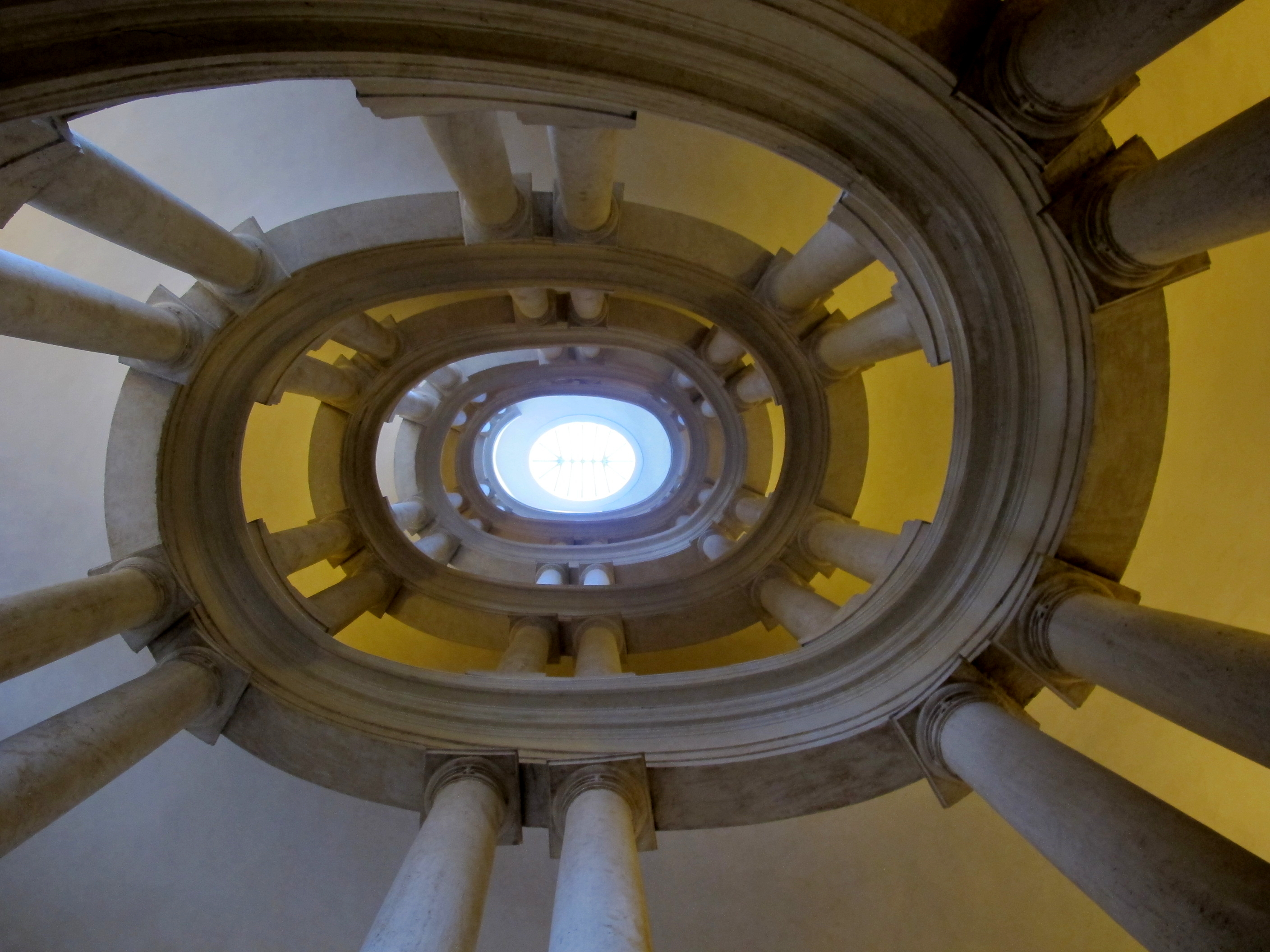 Palazzo barberini, scalone del borromini